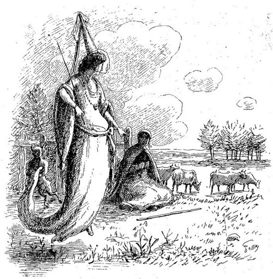 Illustration du conte La houle du châtelet collecté par Paul Sébillot en Haute-Bretagne, 1883. publié dans les contes de terre et de mer, p. 95